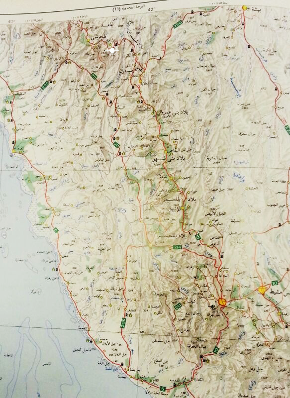 موقع بلاد حوالة على خارطة المملكة